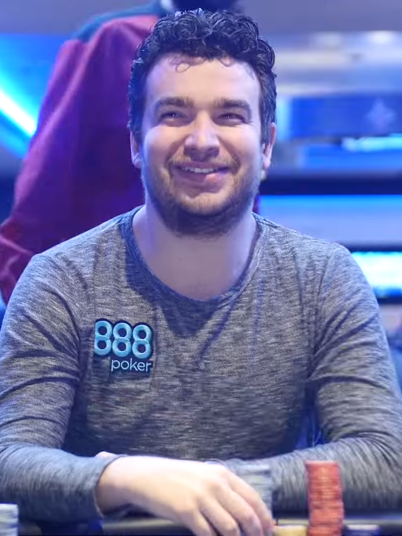 Chris Moorman am Pokertisch